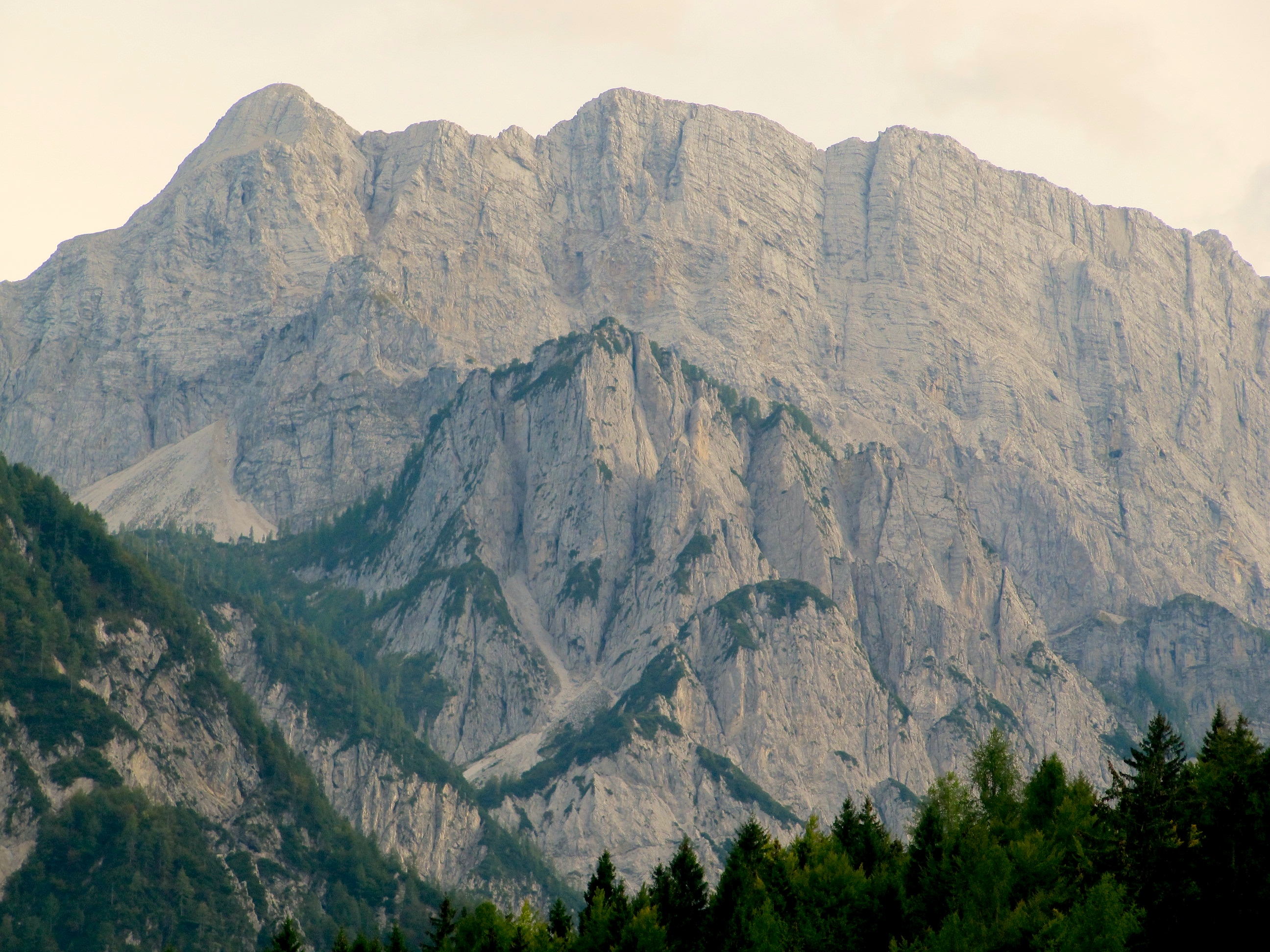 Mojstrovka in Slemenova špica, Julijske Alpe